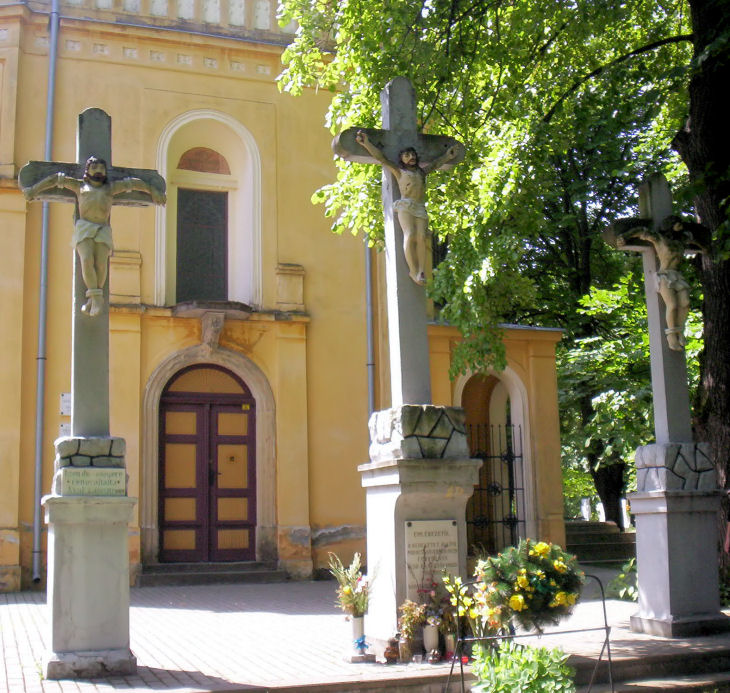 Csatatér kápolna Mohács